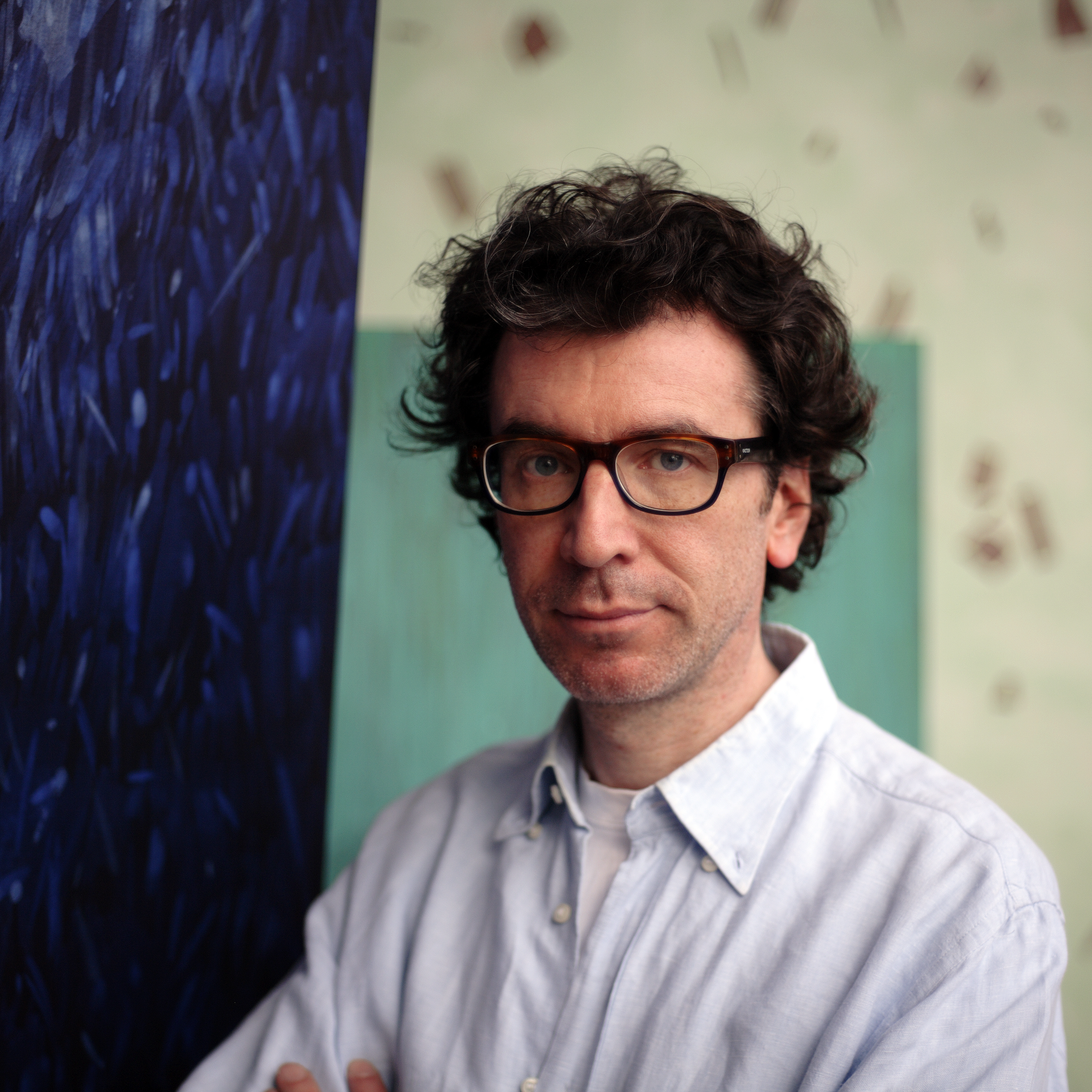 Portrai von Alesandrion (Alexander Wallner) 2011